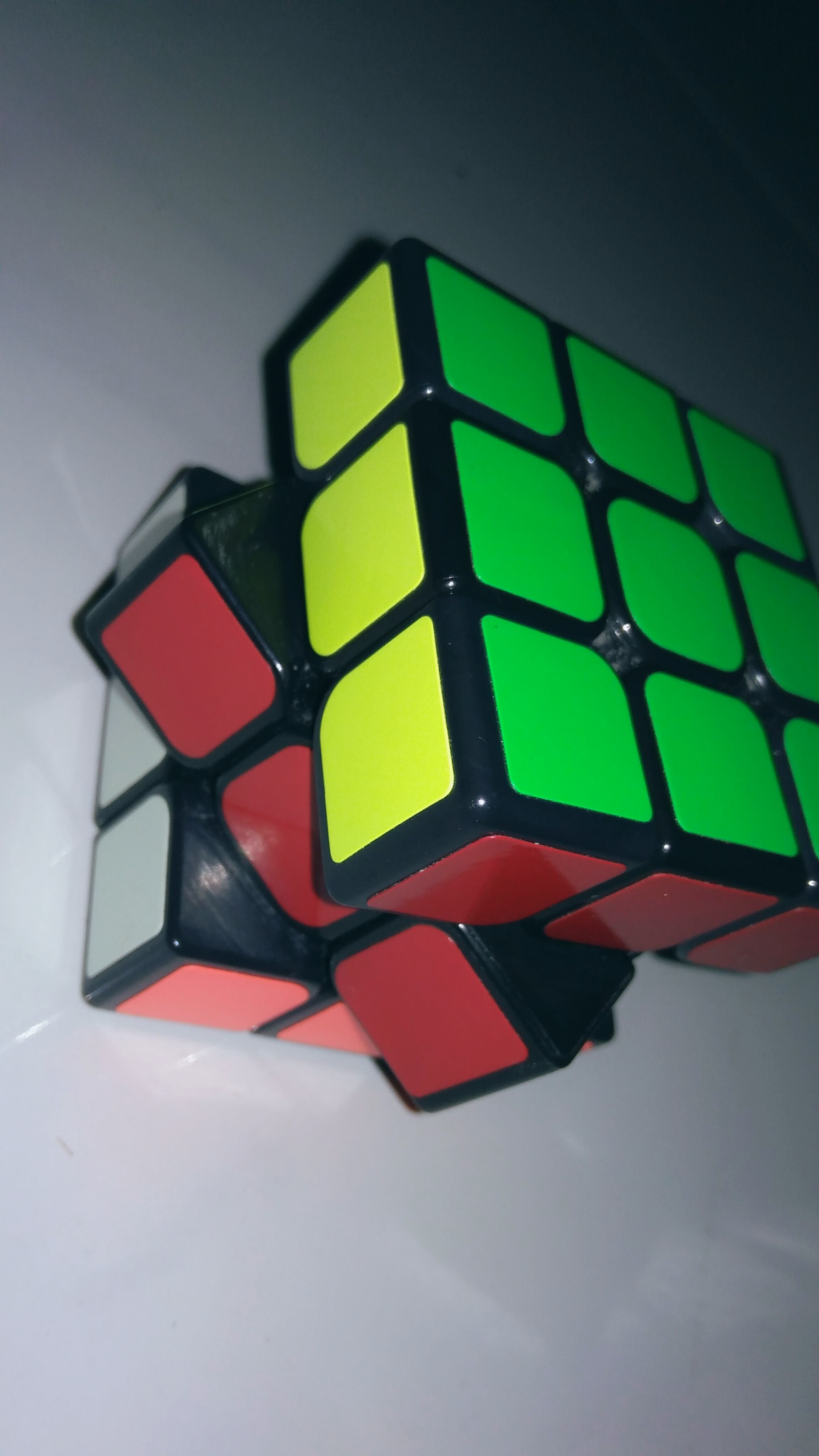 Jawa: Rubic Cube iku salah sawijining dolanan kang bisa nglatih otak.